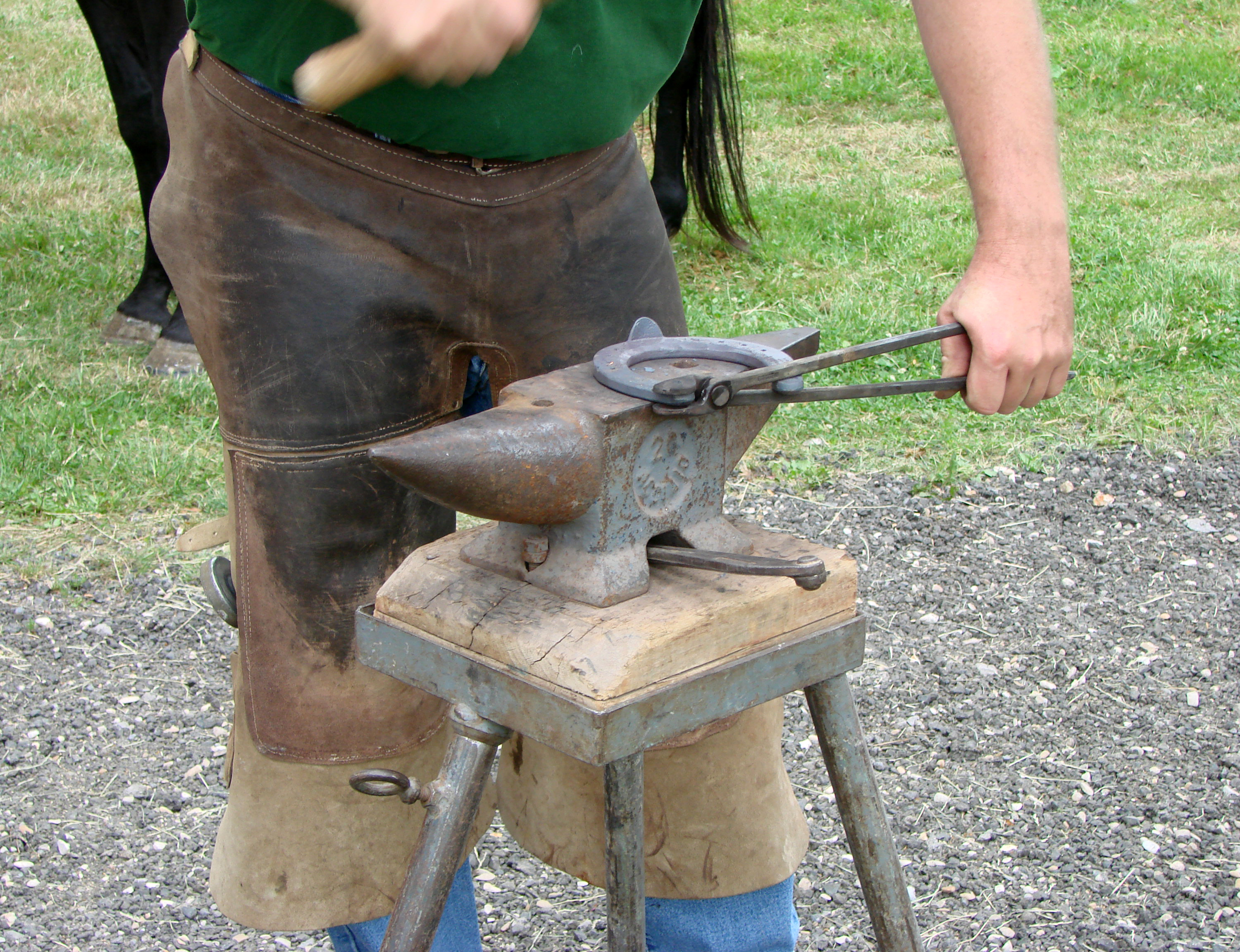 Modelage du fer selon la forme particulière de ce sabot.